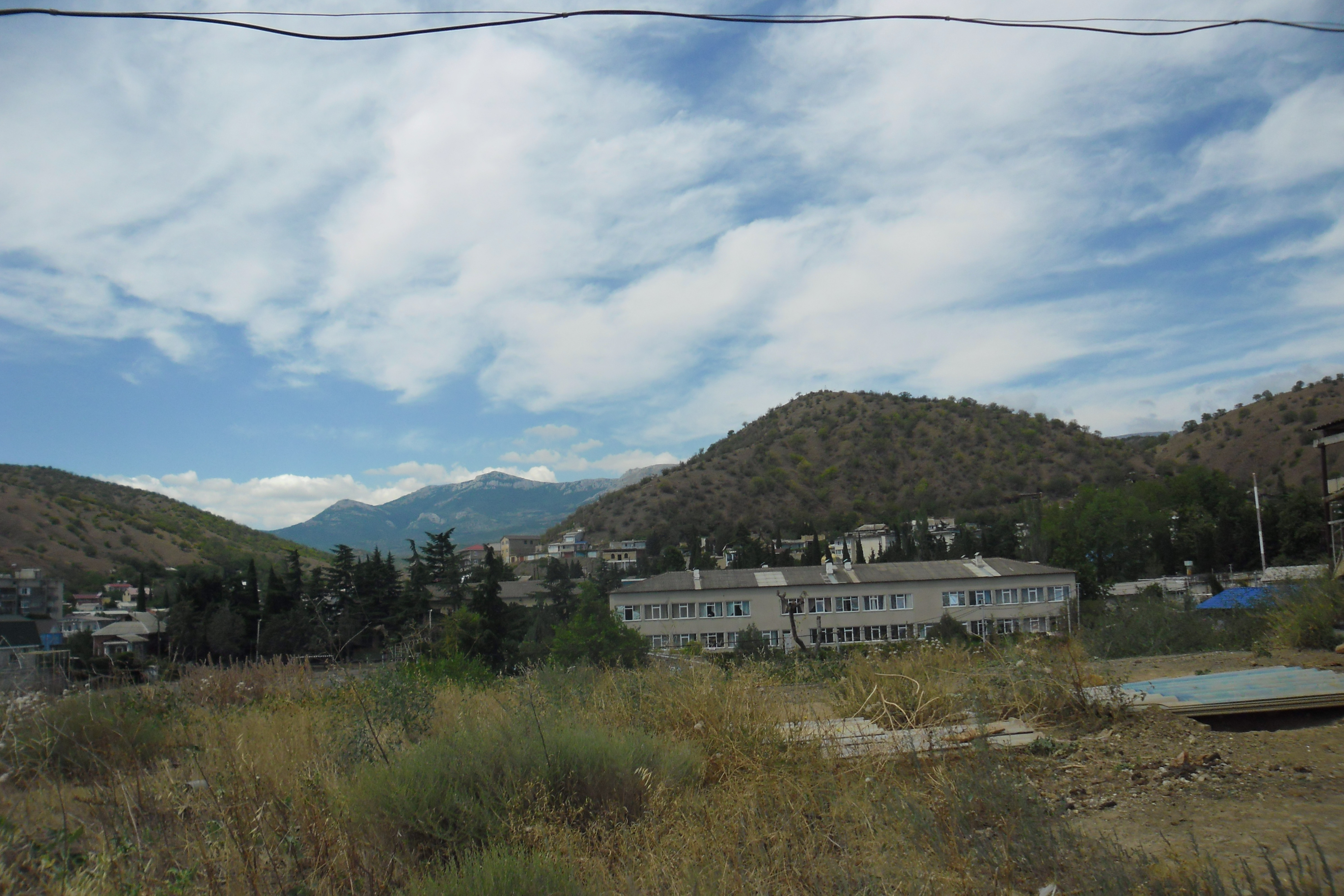 Хумсал